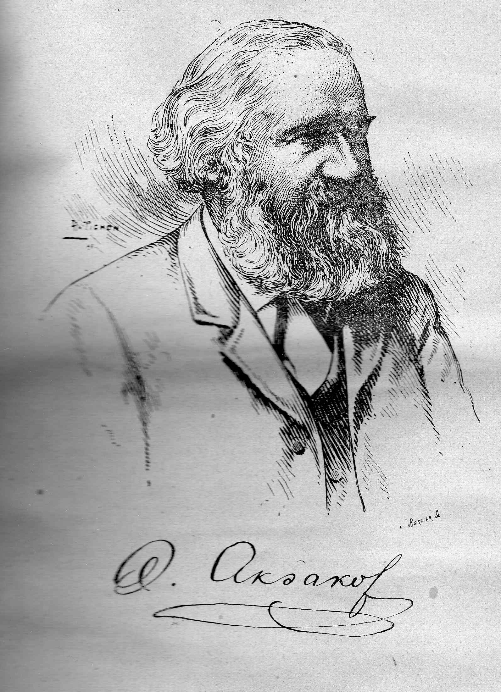 Portrait et signature d'Alexandre Aksakof publiés en page 3 de son livre : Animisme et Spiritisme, Paris, 1906.